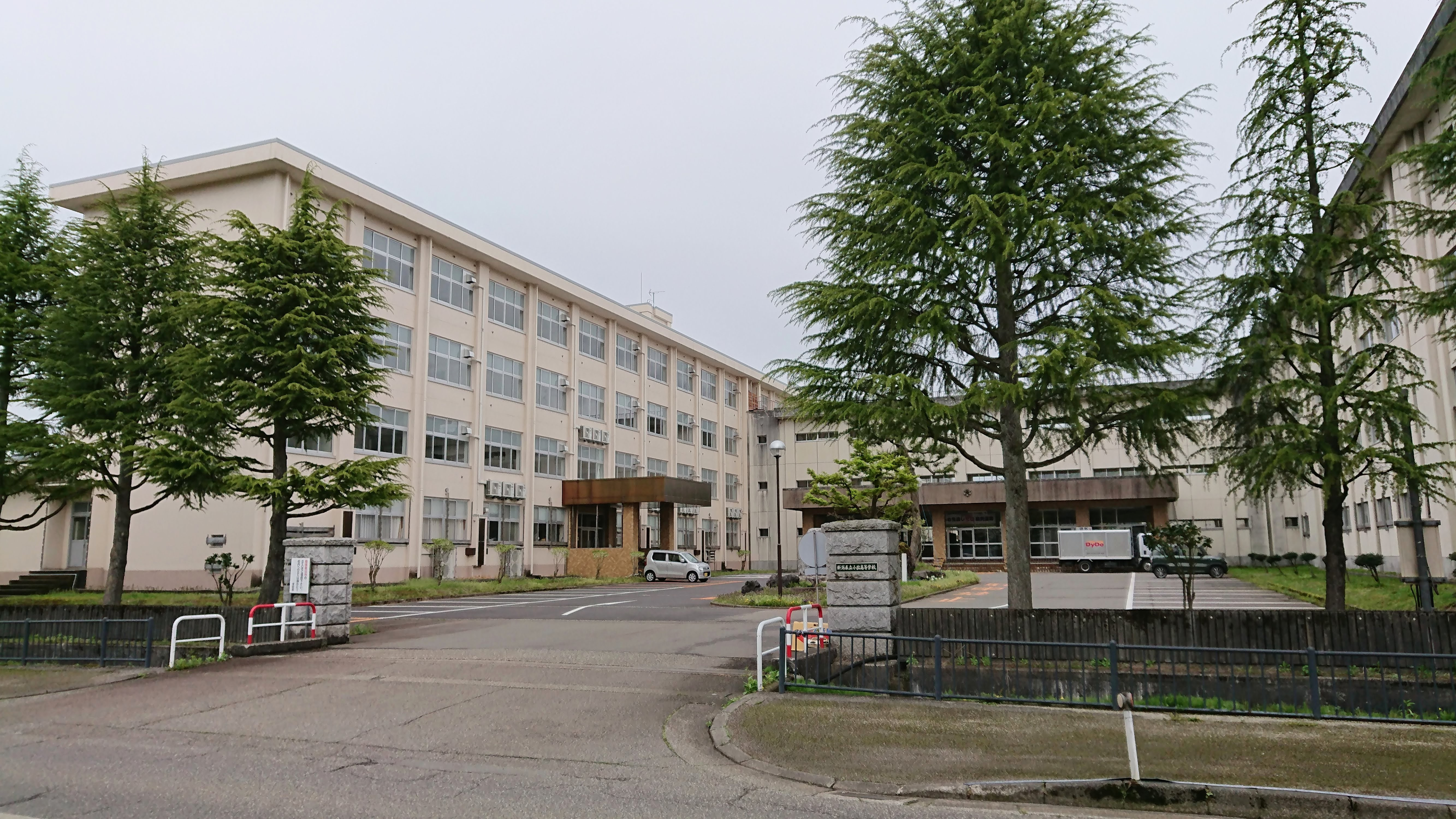 新潟県立小出高等学校の校舎外観